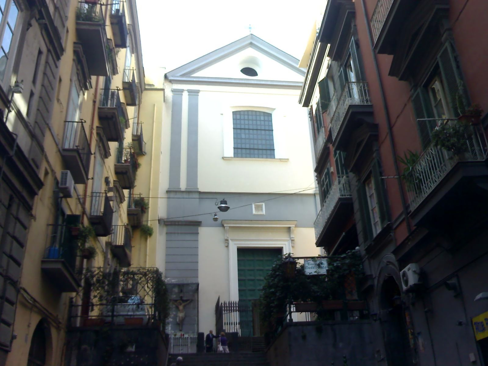 Chiesa di San Giovanni Maggiore di Napoli - Facciata della chiesa da Vico San Giovanni Maggiore